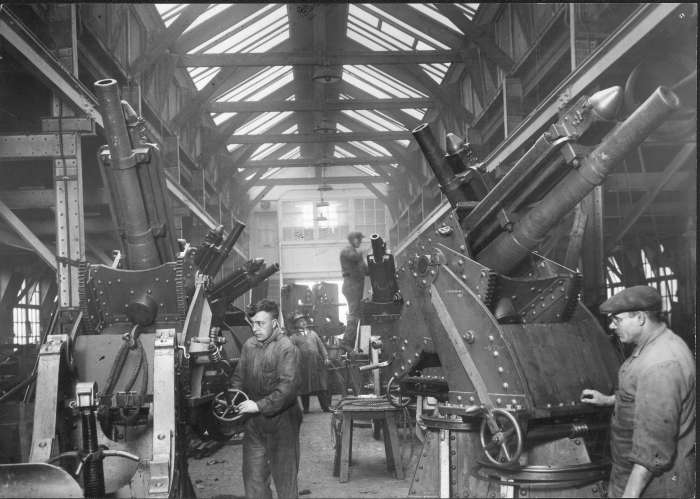 Affuitenwerkplaats Hemkade 18. Tot luchtdoelgeschut omgebouwde stukken kazematgeschut van 7cm. Dit is gebeurd omstreeks 1920-21 bij de werf Gusto en Werspoor, bij de AI werden ze geïnspecteerd en mogelijk op een soort aanhangwagen gezet. Het geschut is nog tijdens de oorlogsdagen van mei 1940 ingezet.